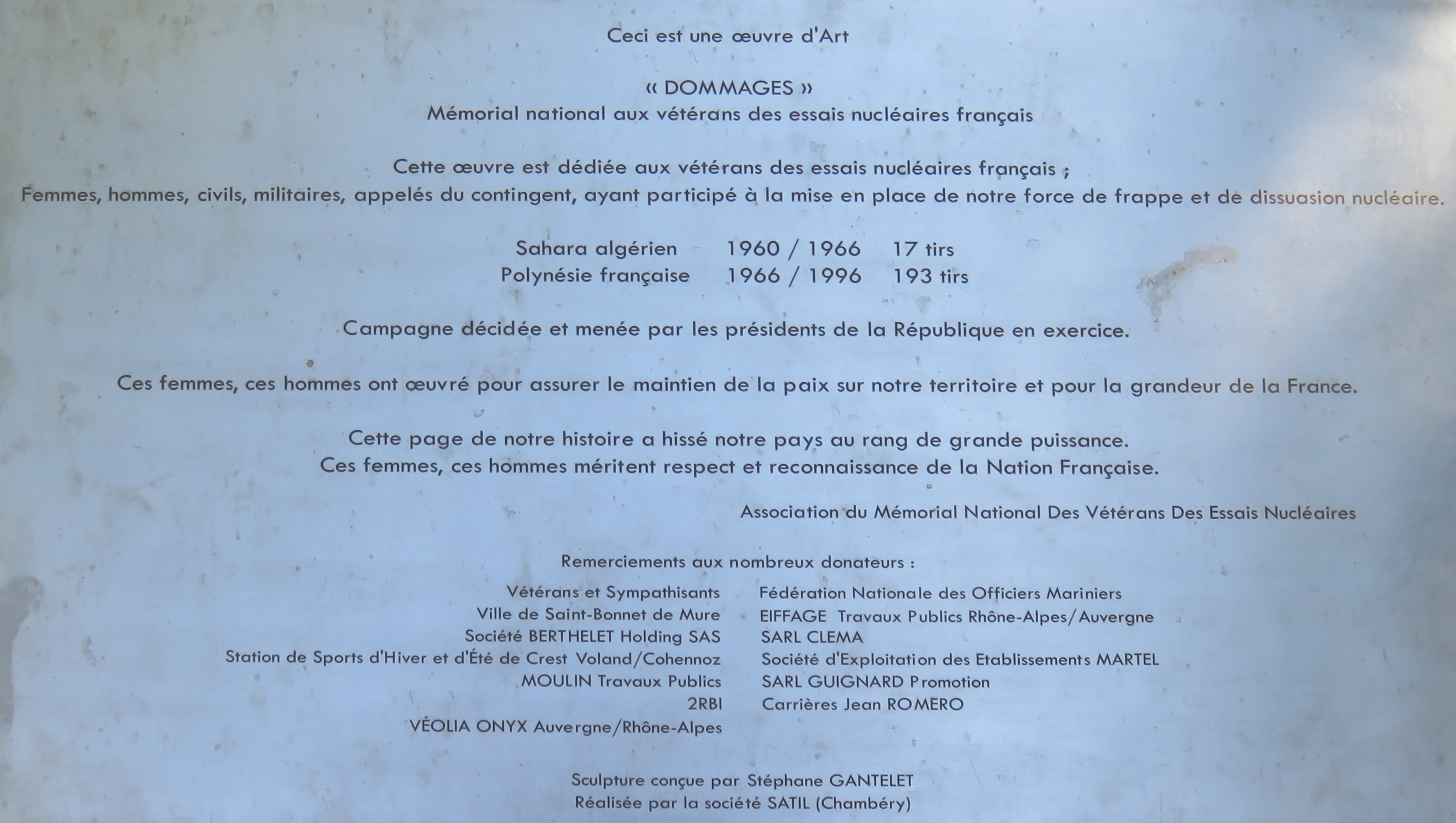 Plaque de l'œuvre d'art "Dommages", du mémorial national aux vétérans des essais nucléaires français, à Saint-Bonnet-de-Mure (Rhône, France).